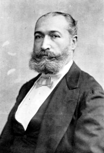 José Rufino Torrico (1833-1920) militar y político peruano, fue alcalde de Lima en 1880-81, 1883-84 y 1895..